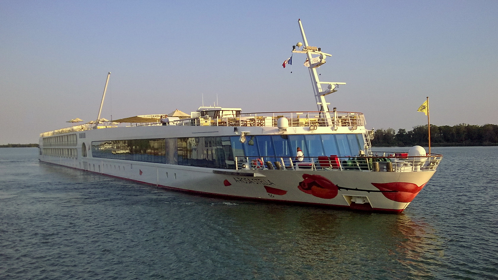 Kabinenfahrgastschiff A-Rosa Stella auf der Rhone